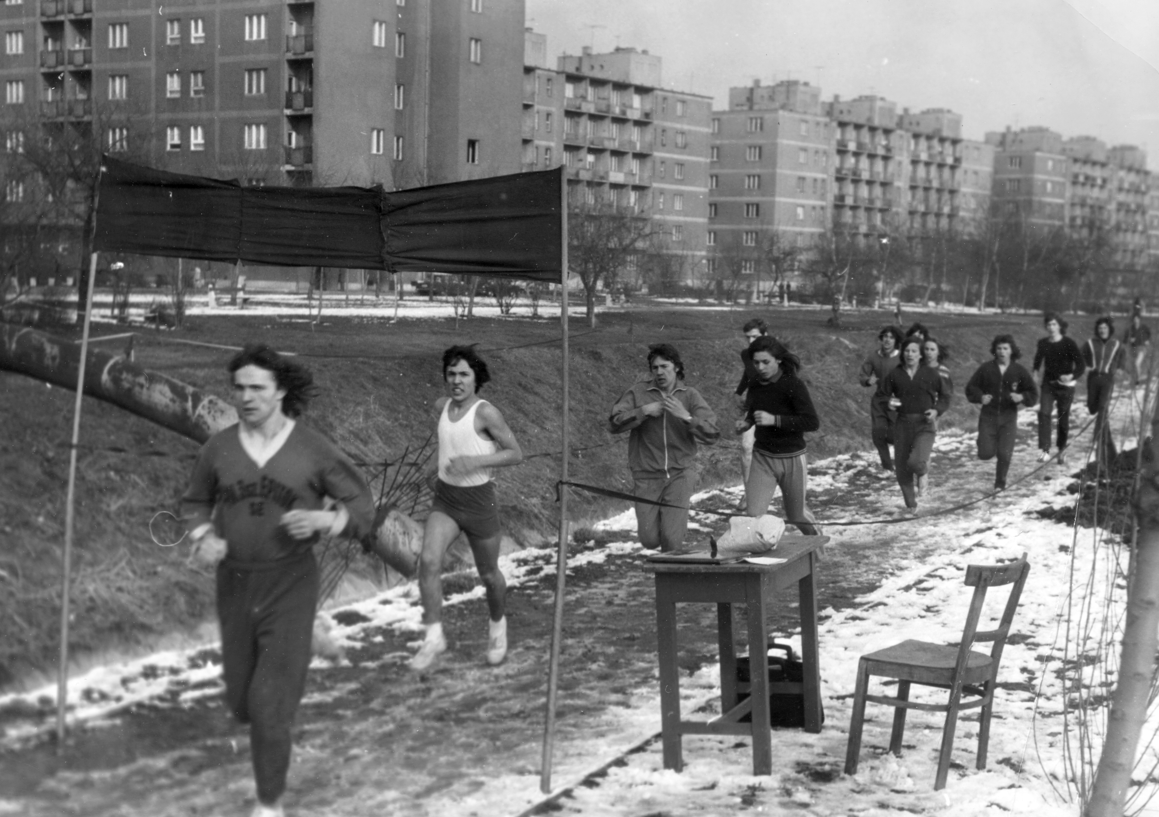 a Rákos-patak partja a Lomb utcánál, a háttérben a Fiastyúk (Thälmann) utcai lakótelep, a Tahi utca házai. Futóverseny a Tanácsköztársaság jubileuma alkalmából. Location: Hungary, Budapest XIII. Tags: snow, competition, running, competitive running, stream, Budapest Title: a Rákos-patak partja a Lomb utcánál, a háttérben a Fiastyúk (Thälmann) utcai lakótelep, a Tahi utca házai. Futóverseny a Tanácsköztársaság jubileuma alkalmából.